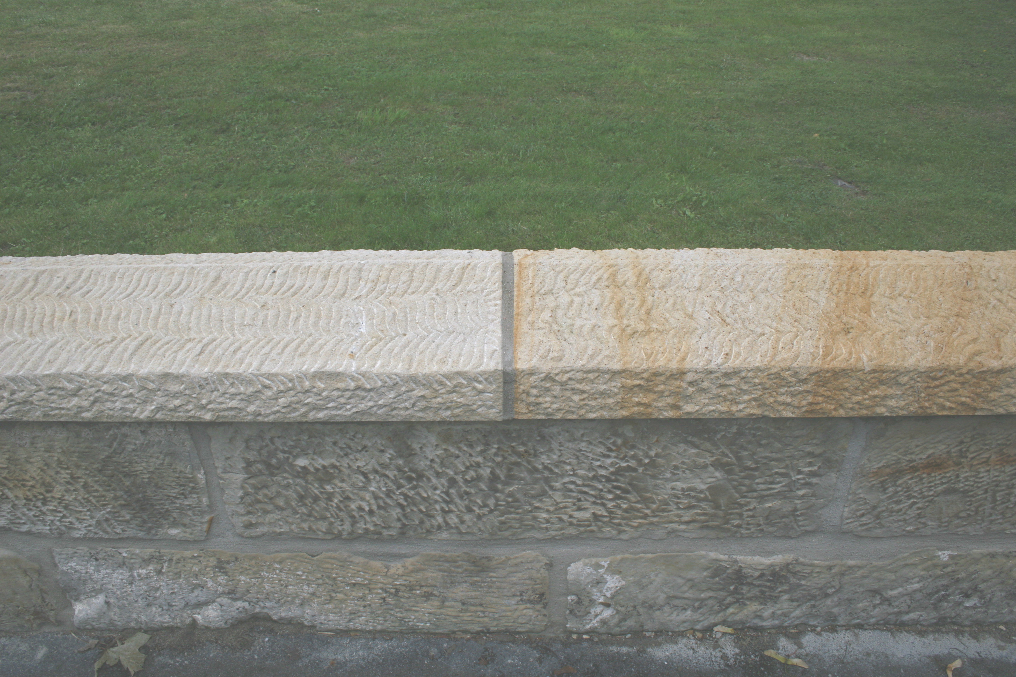 Abdeckstein auf einer Mauer aus Sandstein